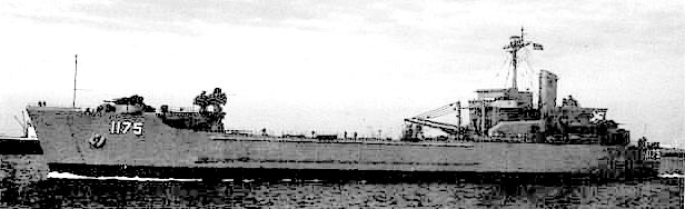 Ship